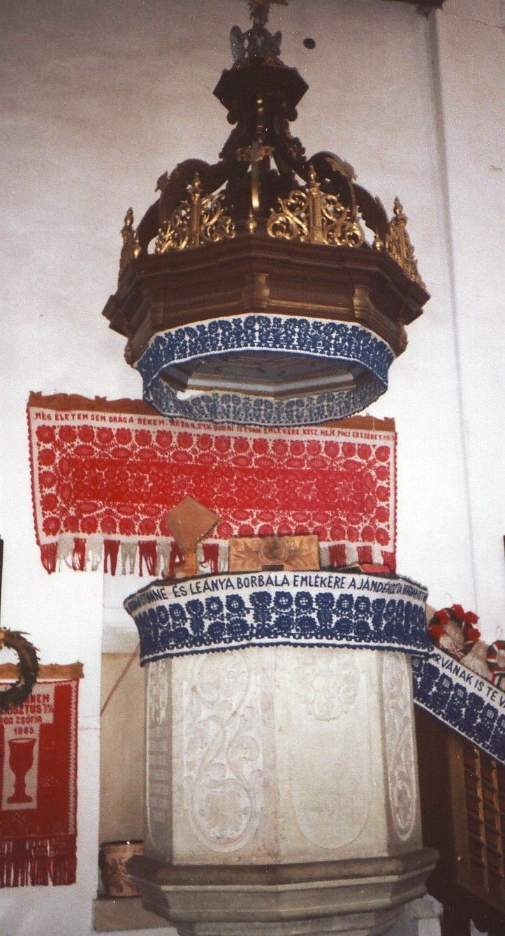 Bánffyhunyadi (Erdély) templom szószéke